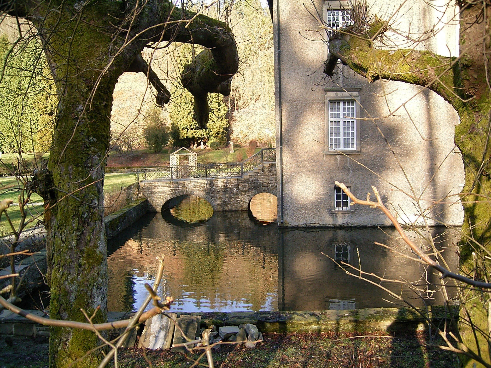 Schloss Neuenhof in Lüdenscheid